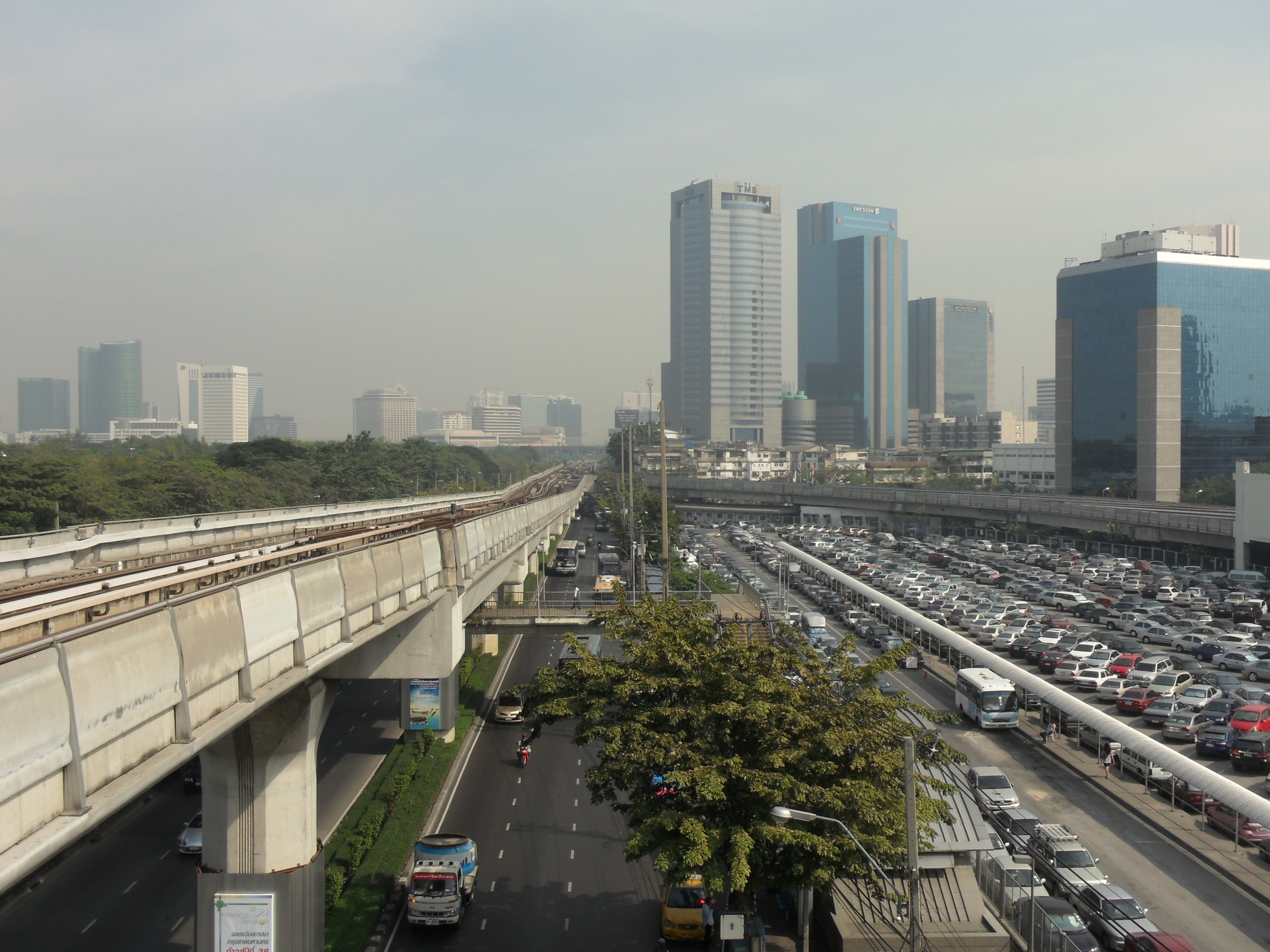 Станция Mo Chit (BTS)